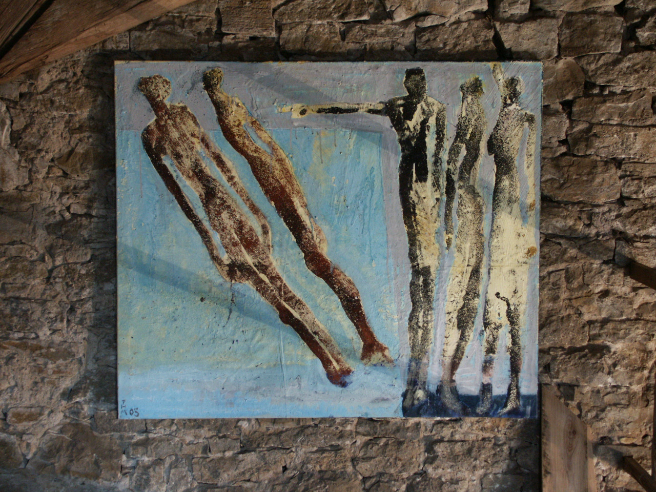 Gemälde von Thomas Mehrlaender auf einer Ausstellung im Jahr 2005